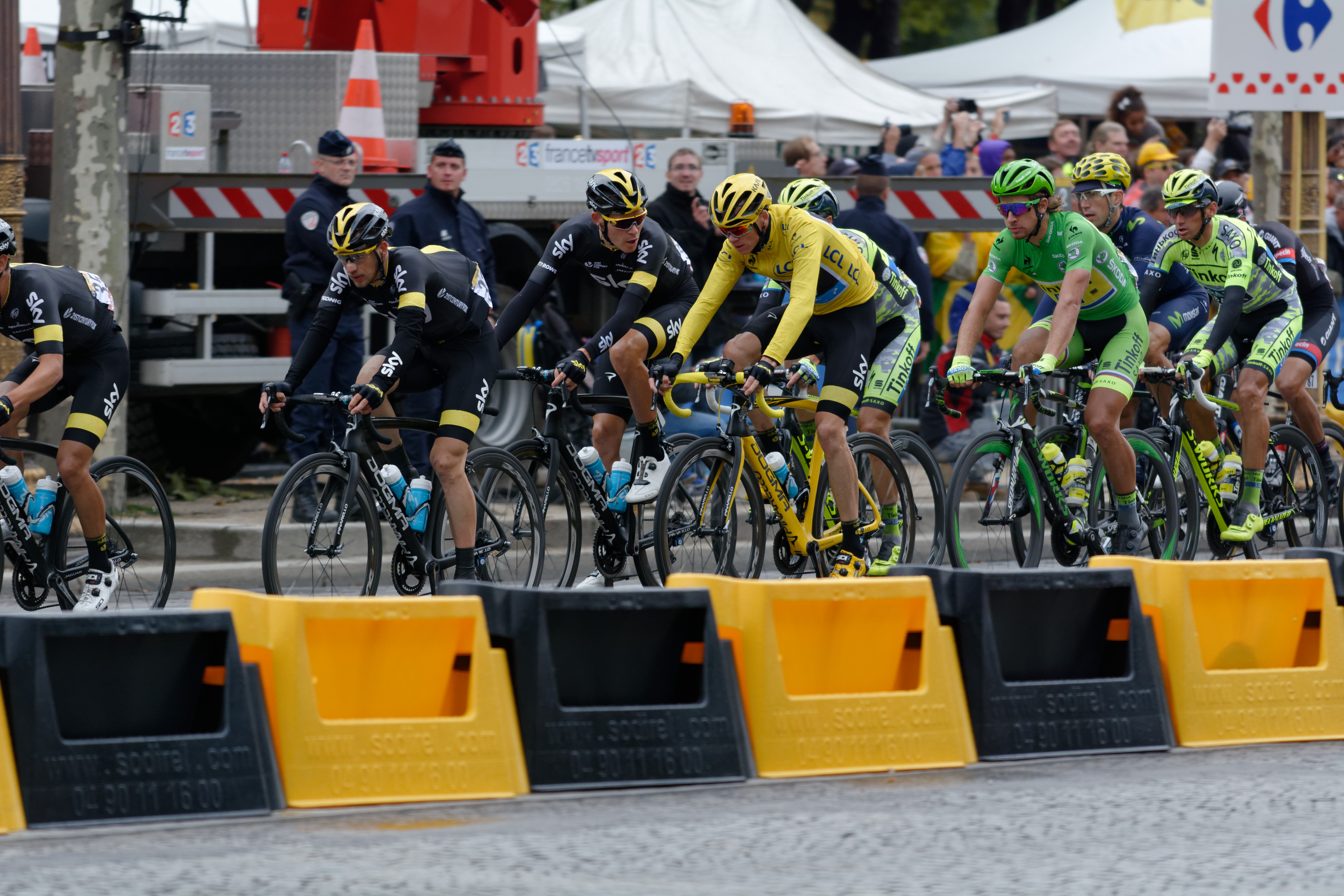 D71_2580_DxO